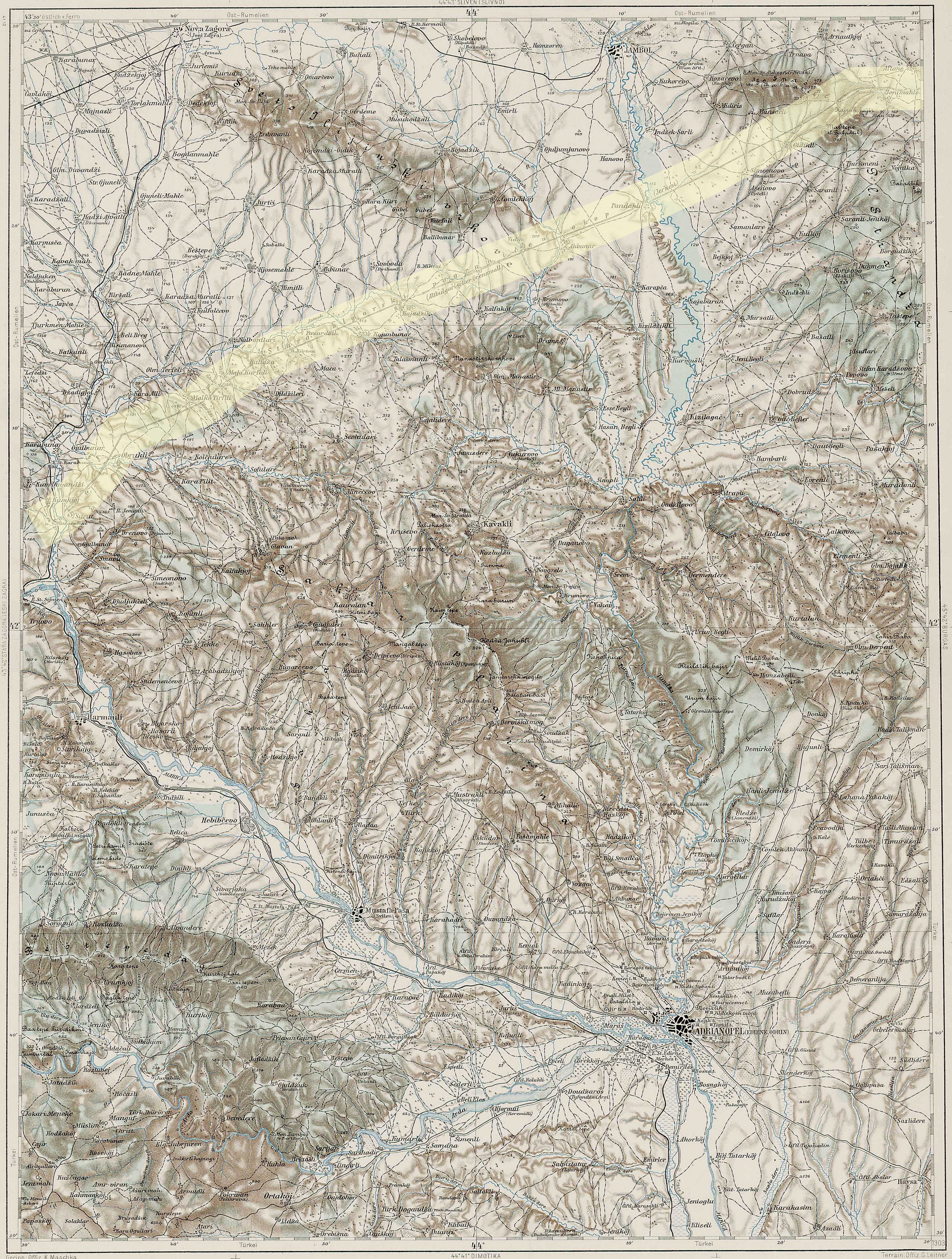 map 44-42 erkesia